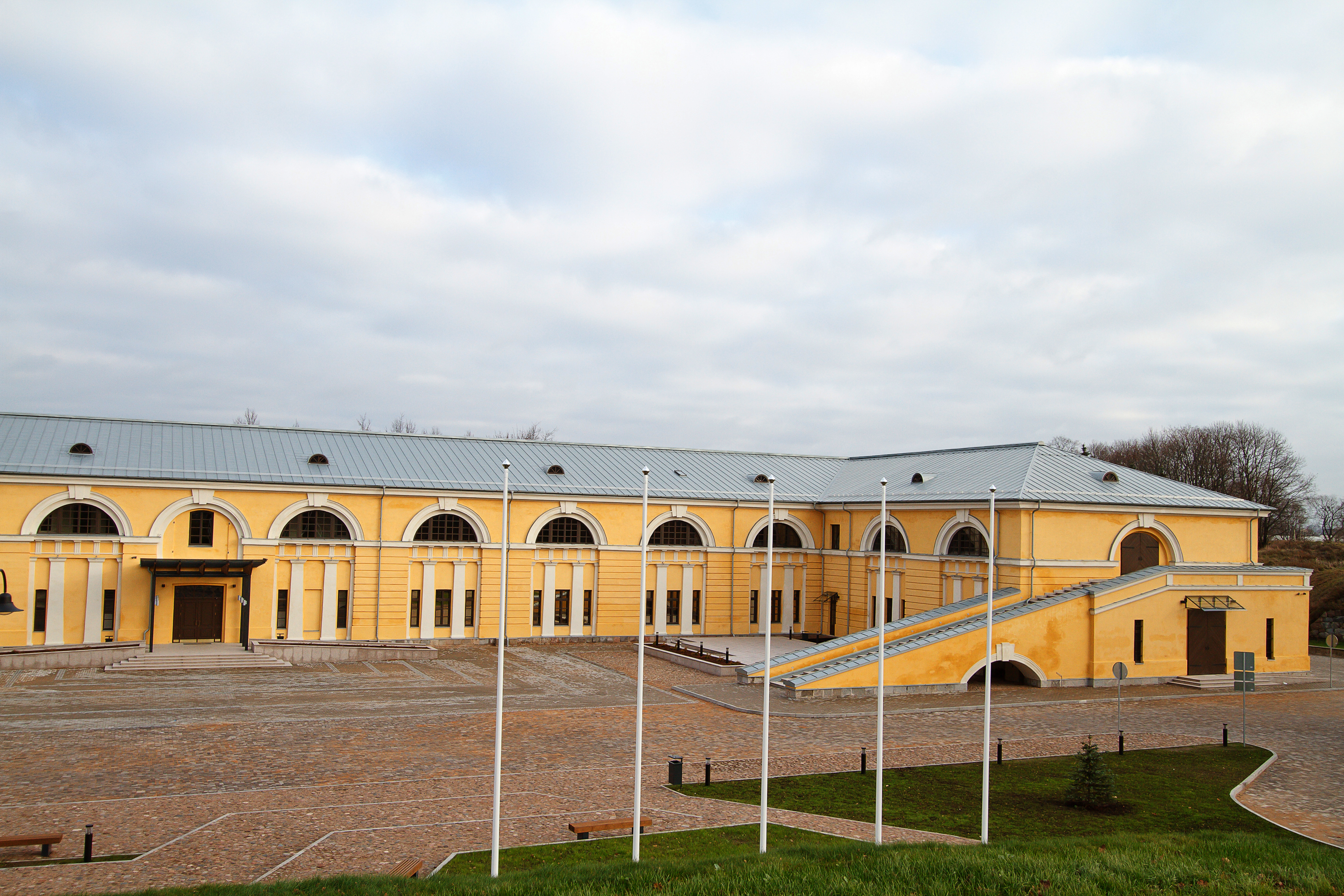 АРТ ЦЕНТР ИМ. МАРКА РОТКО В ДАУГАВПИЛСЕ